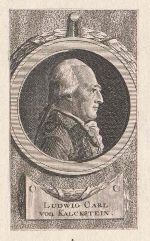 Ludwig Karl von Kalckstein (* 10. März 1725 in Berlin ; † 12. November 1800 in Magdeburg) war ein königlich preußischer Generalfeldmarschall